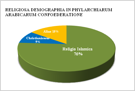 Religiones in Phylarchiarum Arabicarum Confoederatione